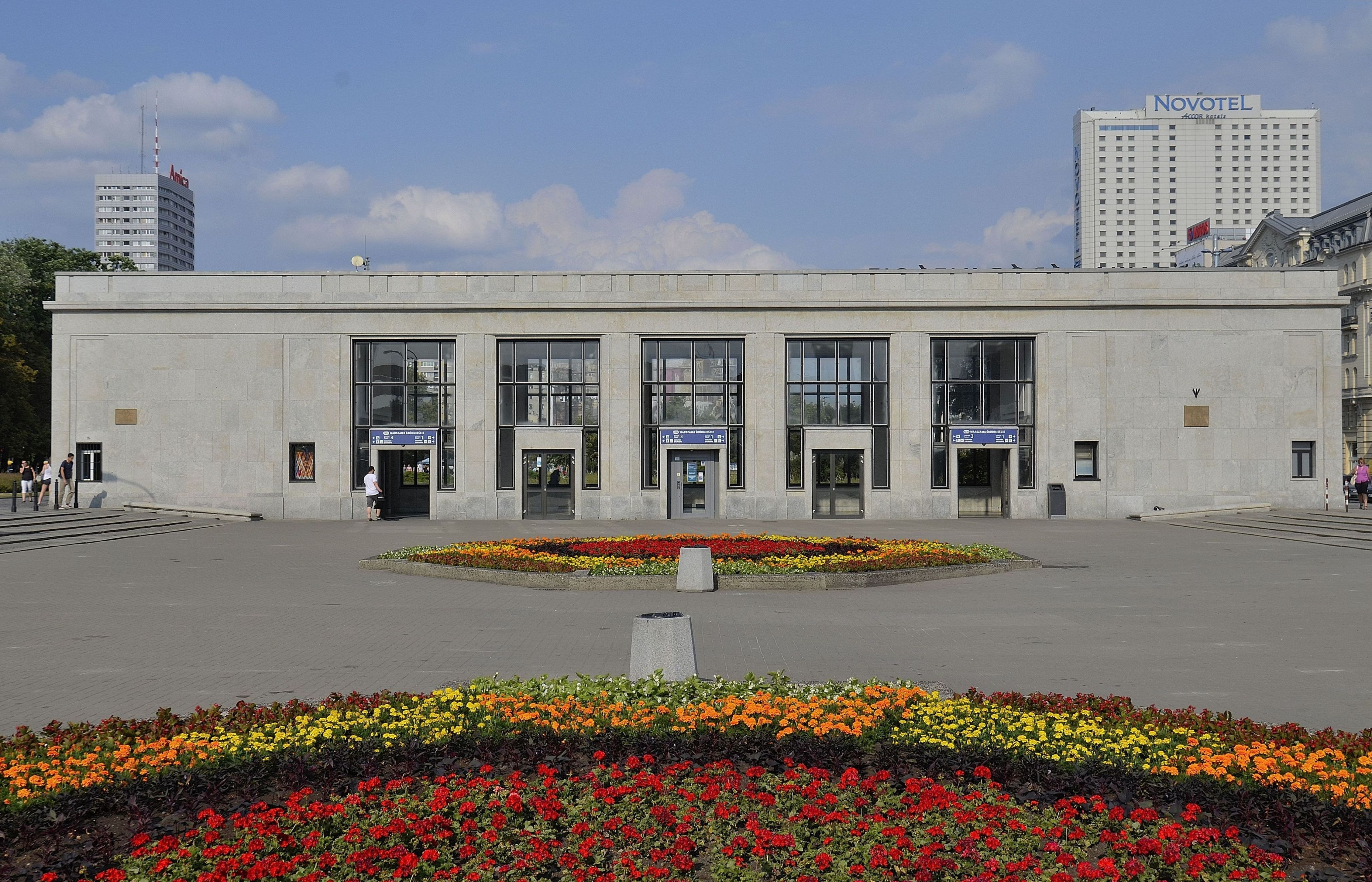 Wchodni pawilon dworca Warszawa Śródmieście